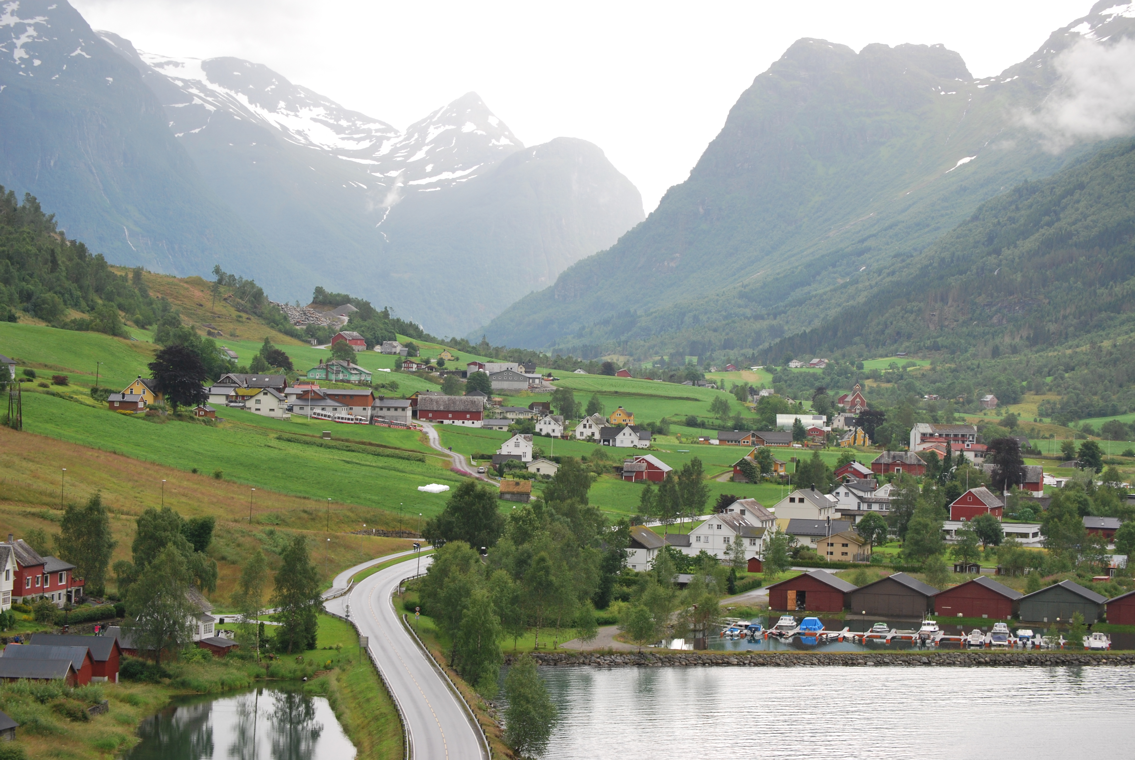 Olden (177)